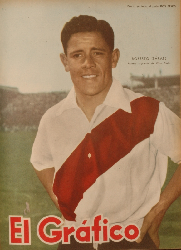 Tapa de la revista El Grafico de 1956 (Edición 1915)